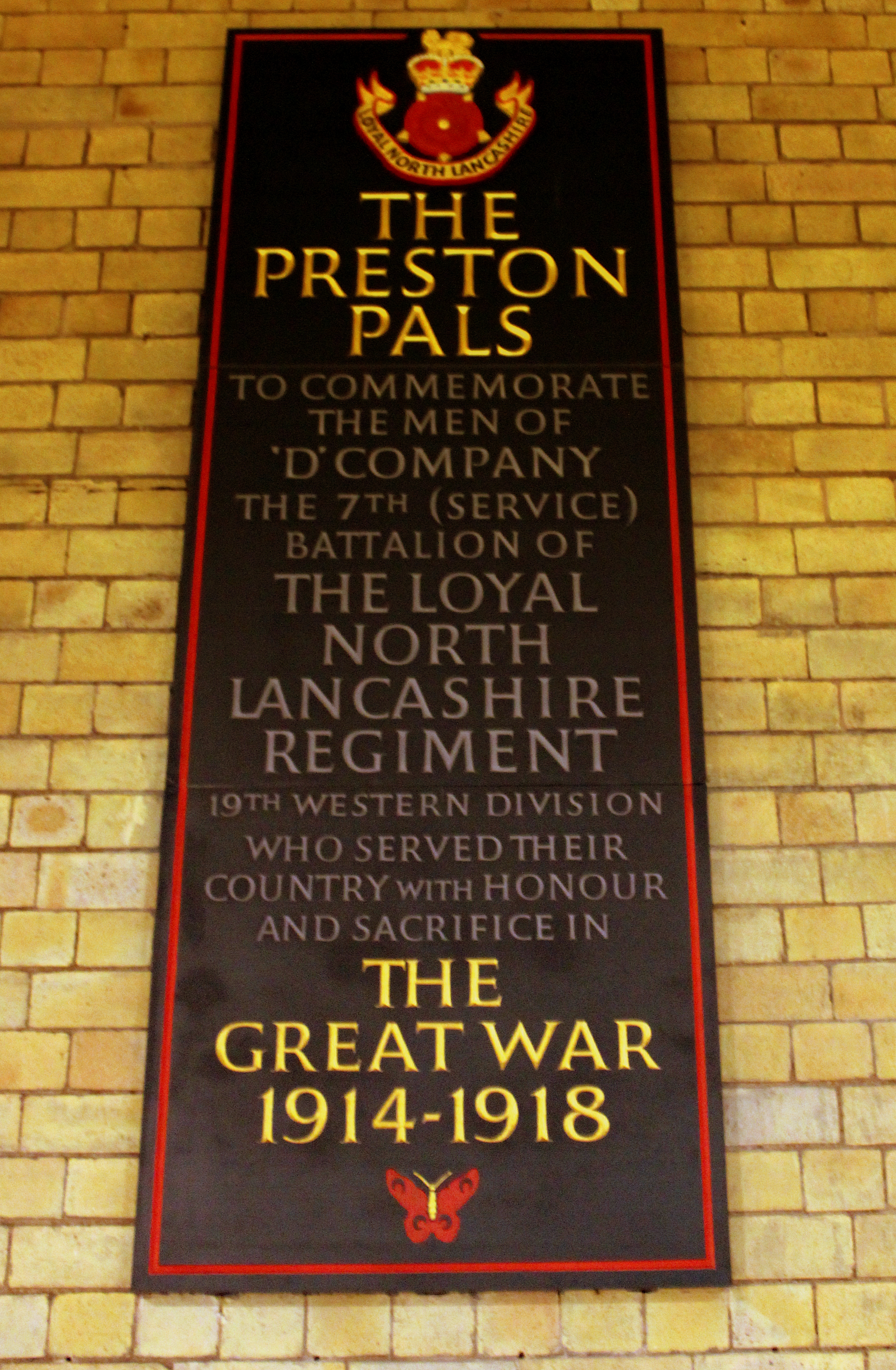 PRESTON PALS MEMORIAL AT PRESTON STATION OCT 2013